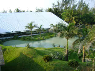 USBI-CTZ